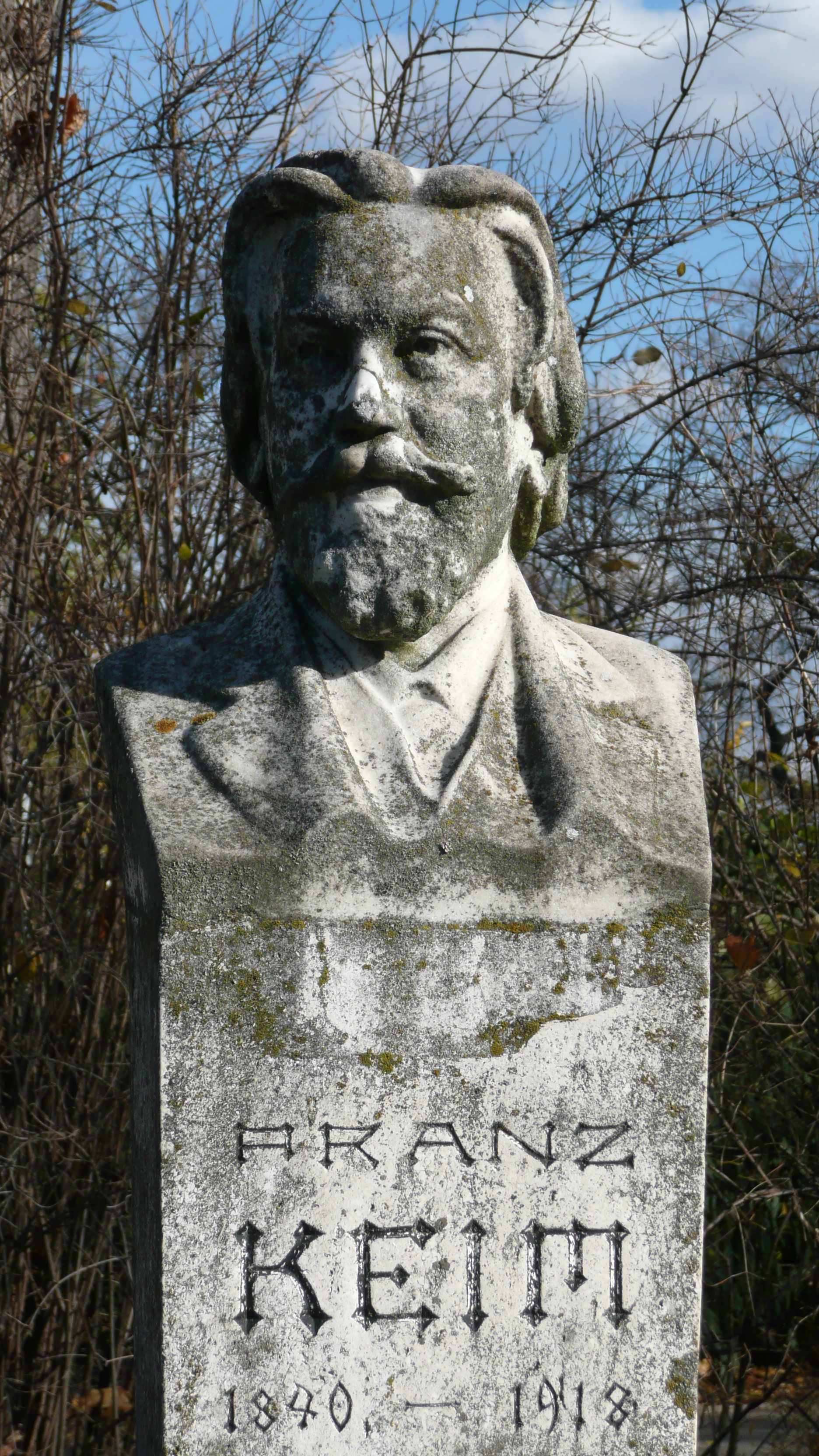 Franz Keim - österreichischer Schriftsteller, 1840 - 1918, Denkmal im Wertheimsteinpark von Wien; Bildhauer: Fritz Hänlein, 1924